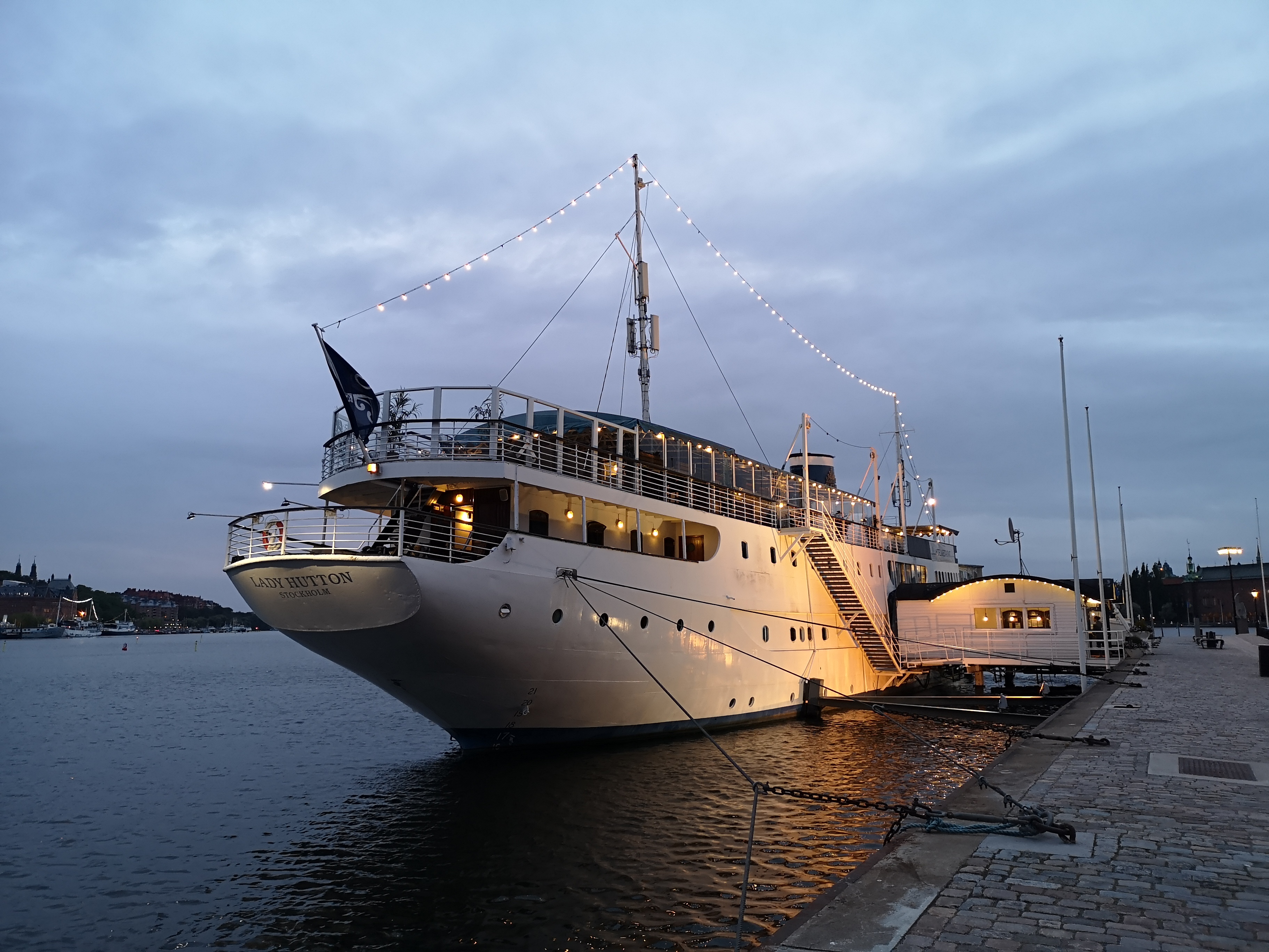 Abendlicht mit dem Schiff Lady Hutton